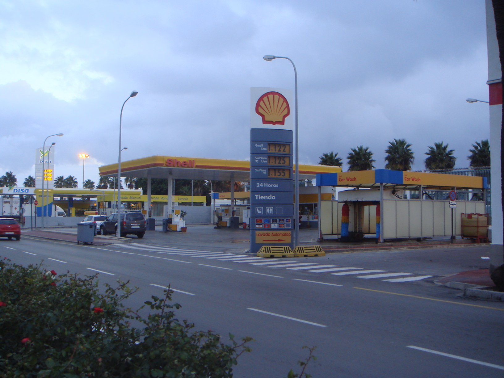 Gasolinera Shell, Ceuta, España.